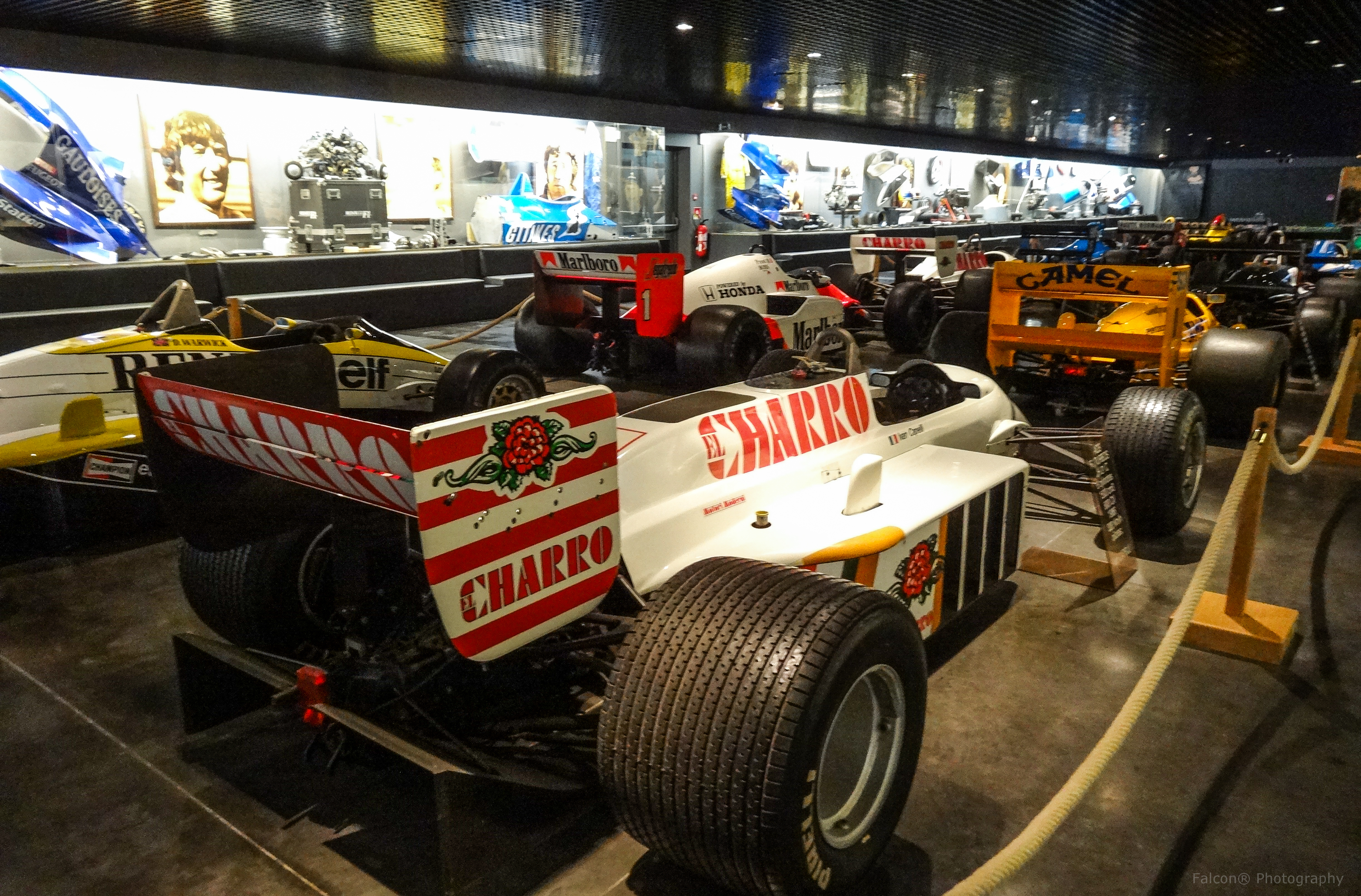 Châssis Renault RE40 Motori Moderni V6 turbo 780cv 560kg Pilote : CAPELLI Ivan 2 courses. Construite par 7 mécaniciens dans un petit hangar.